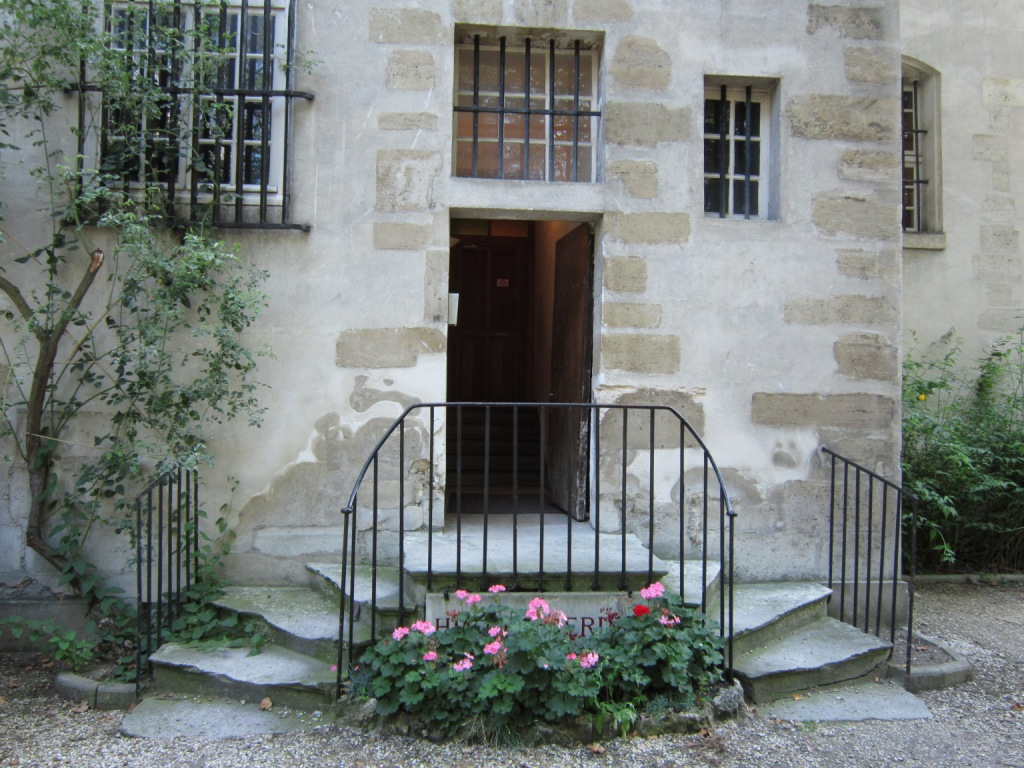 Escalier des martyrs, Église Saint-Joseph-des-Carmes